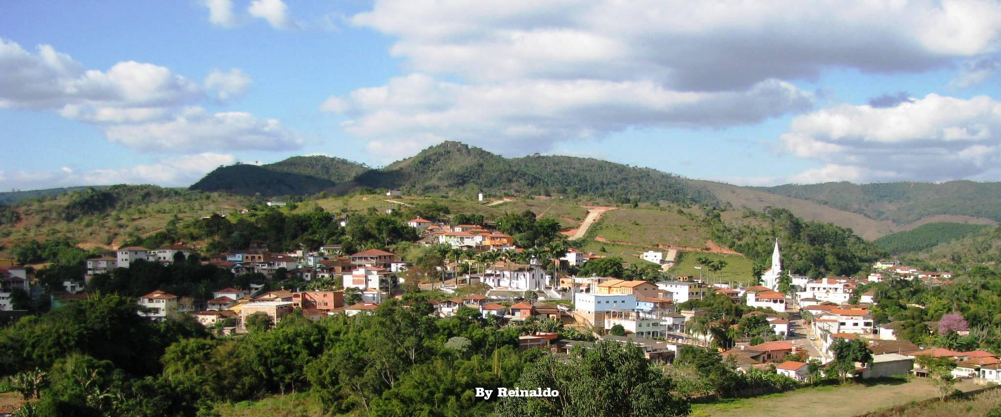 VISTA PARCIAL